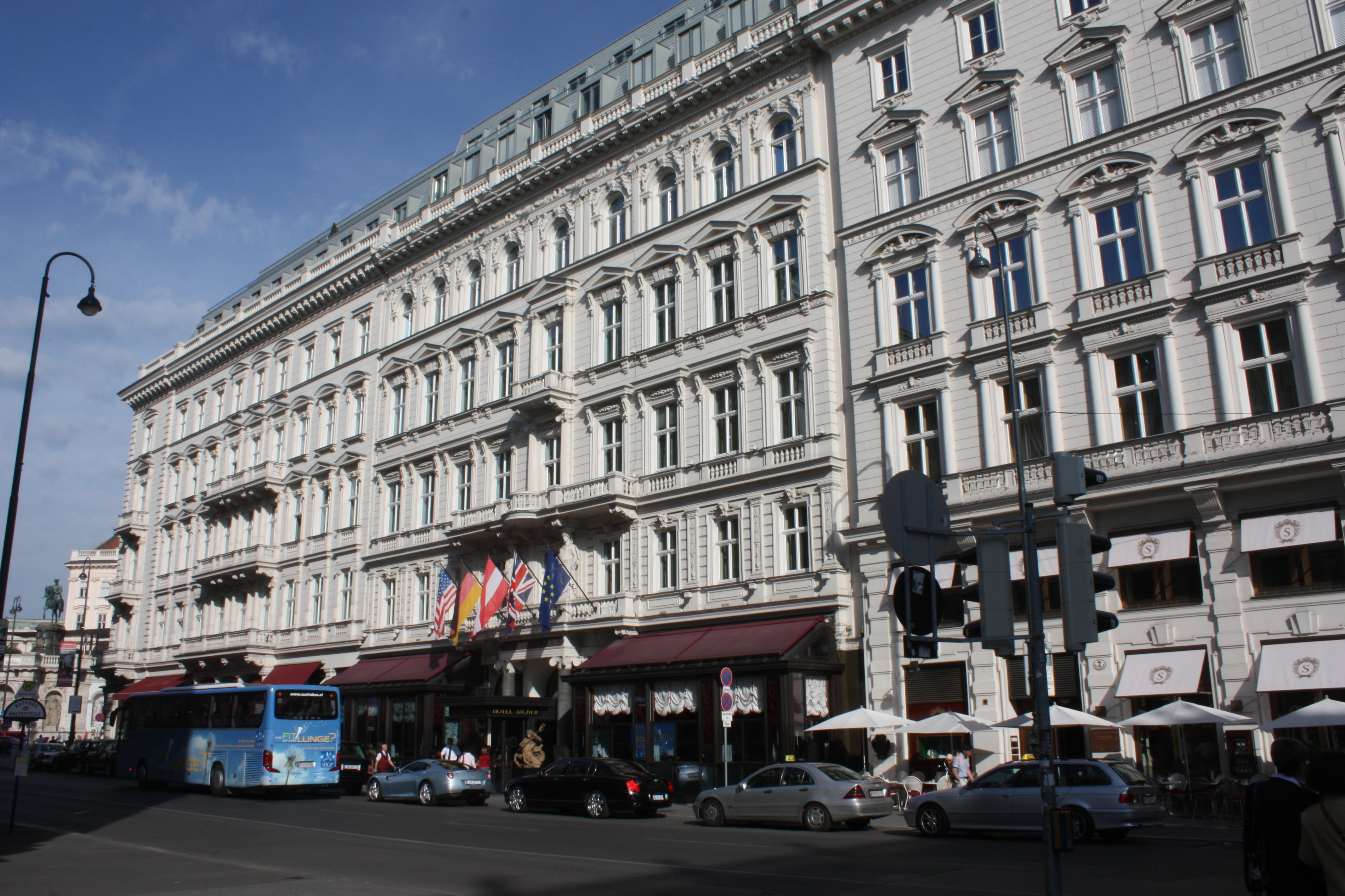 Hotel Sacher, Wien 1., Philharmonikerstraße 4